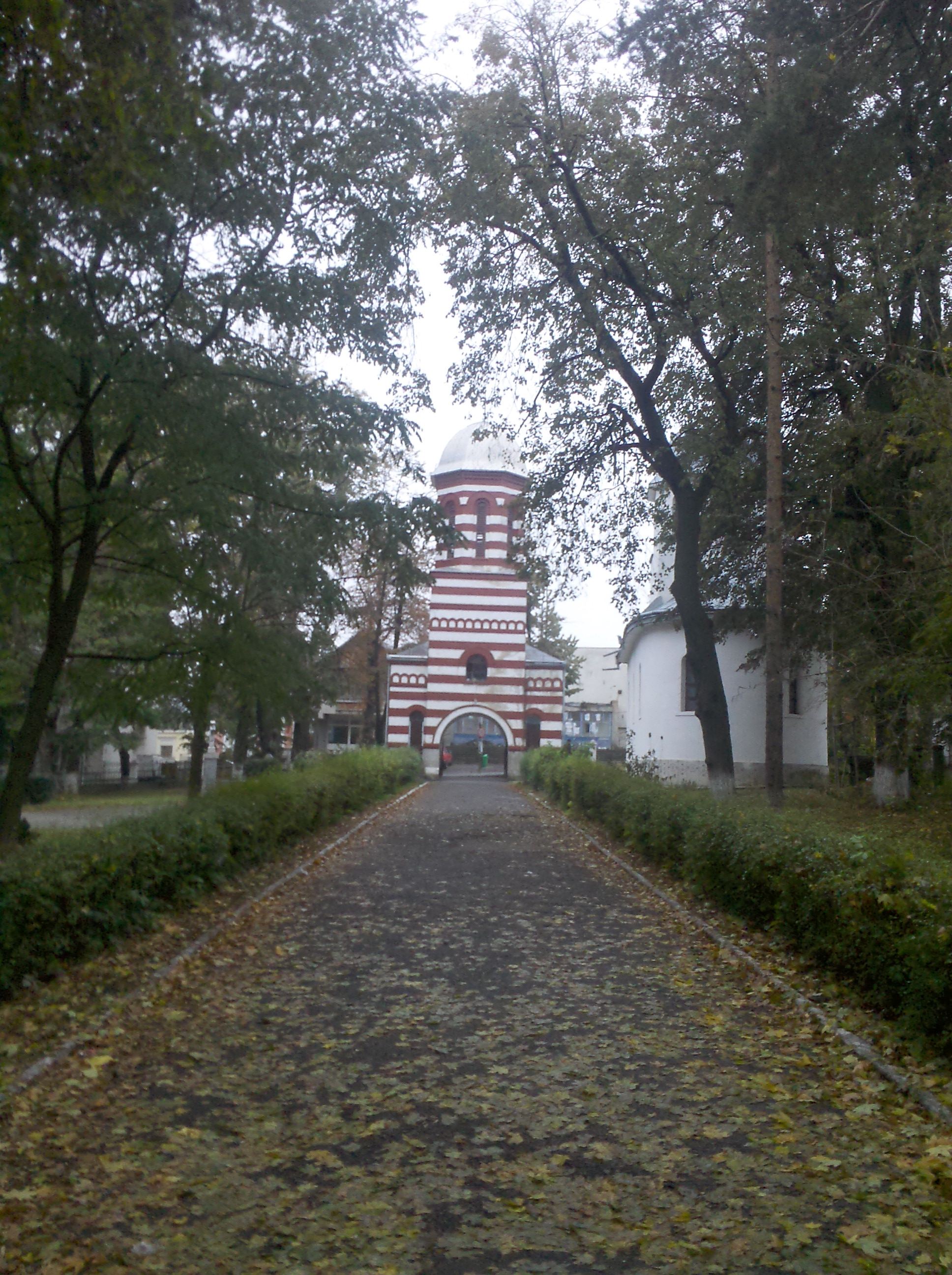 Torre con campanar -Dorohoi BT